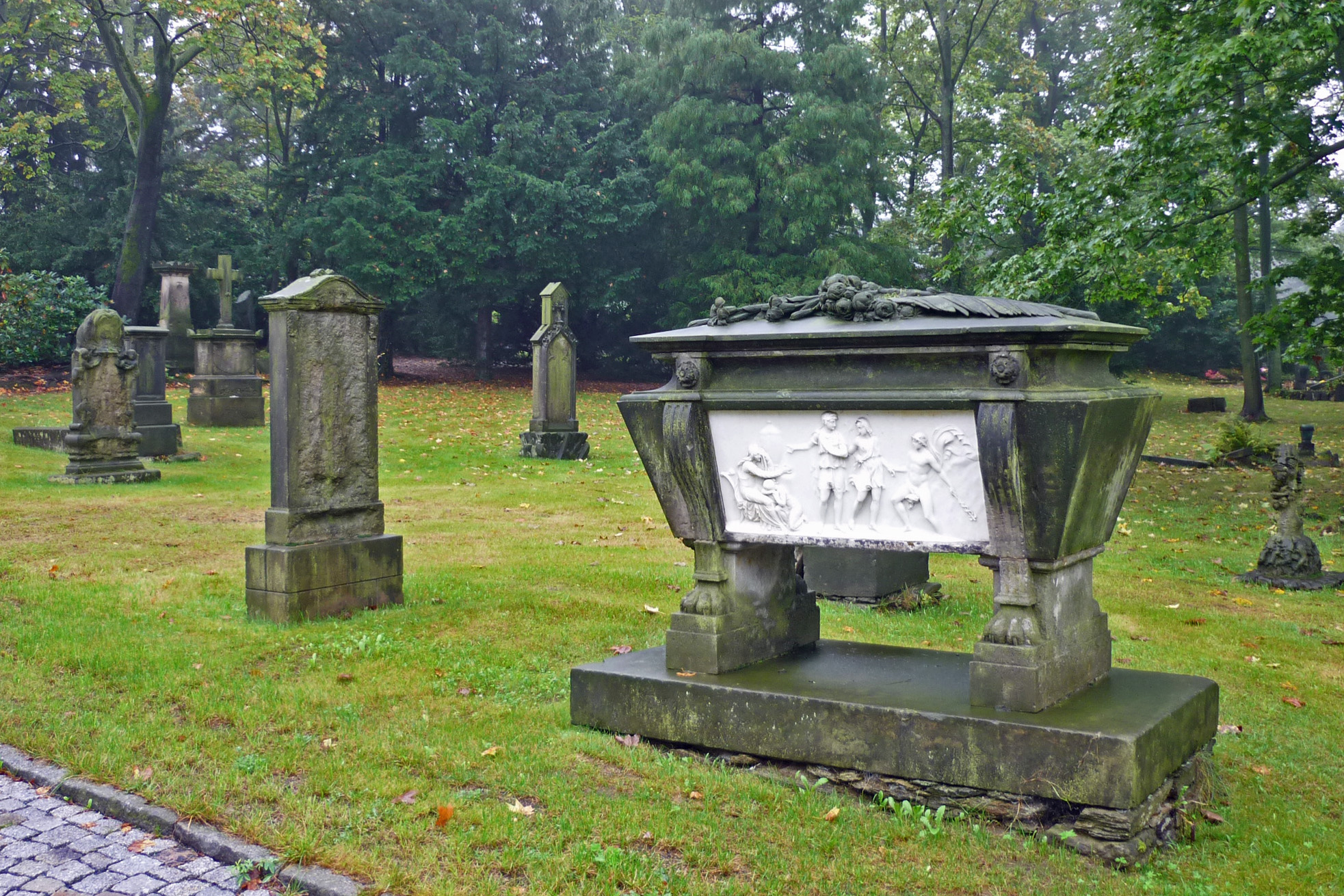 Alte Grabsteine auf dem Donatsfriedhof in Freiberg (Sachsen)